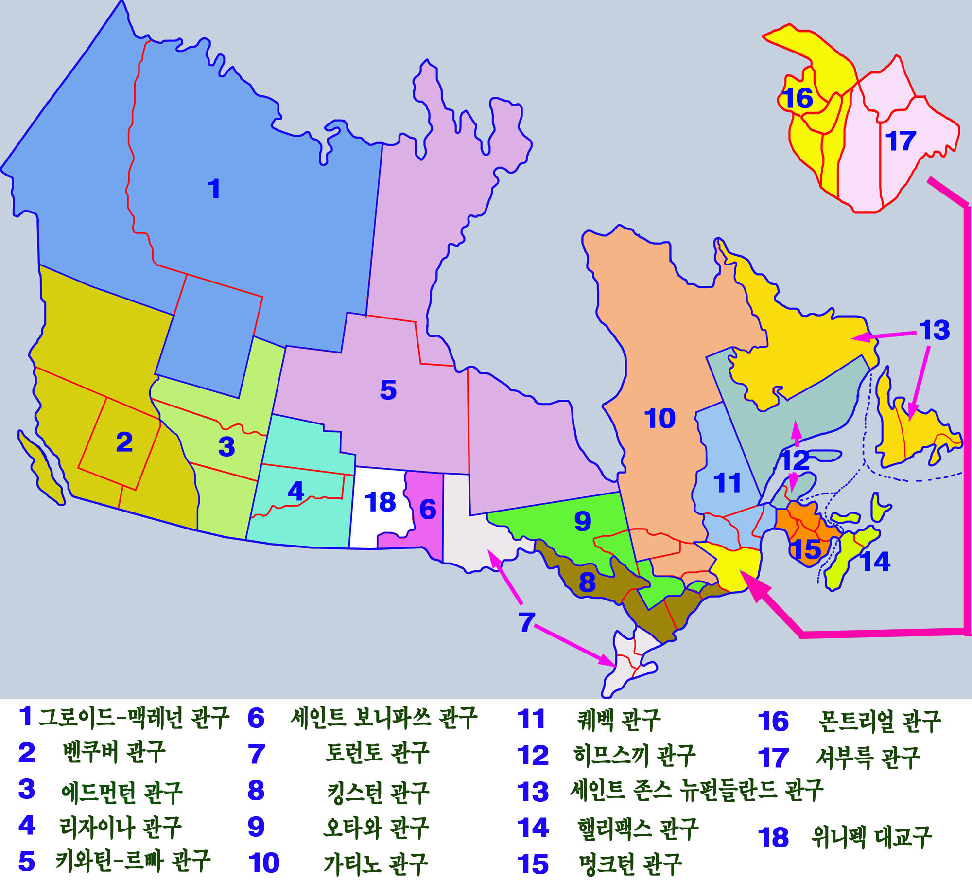 카나다 가톨릭교구 관구 구역도